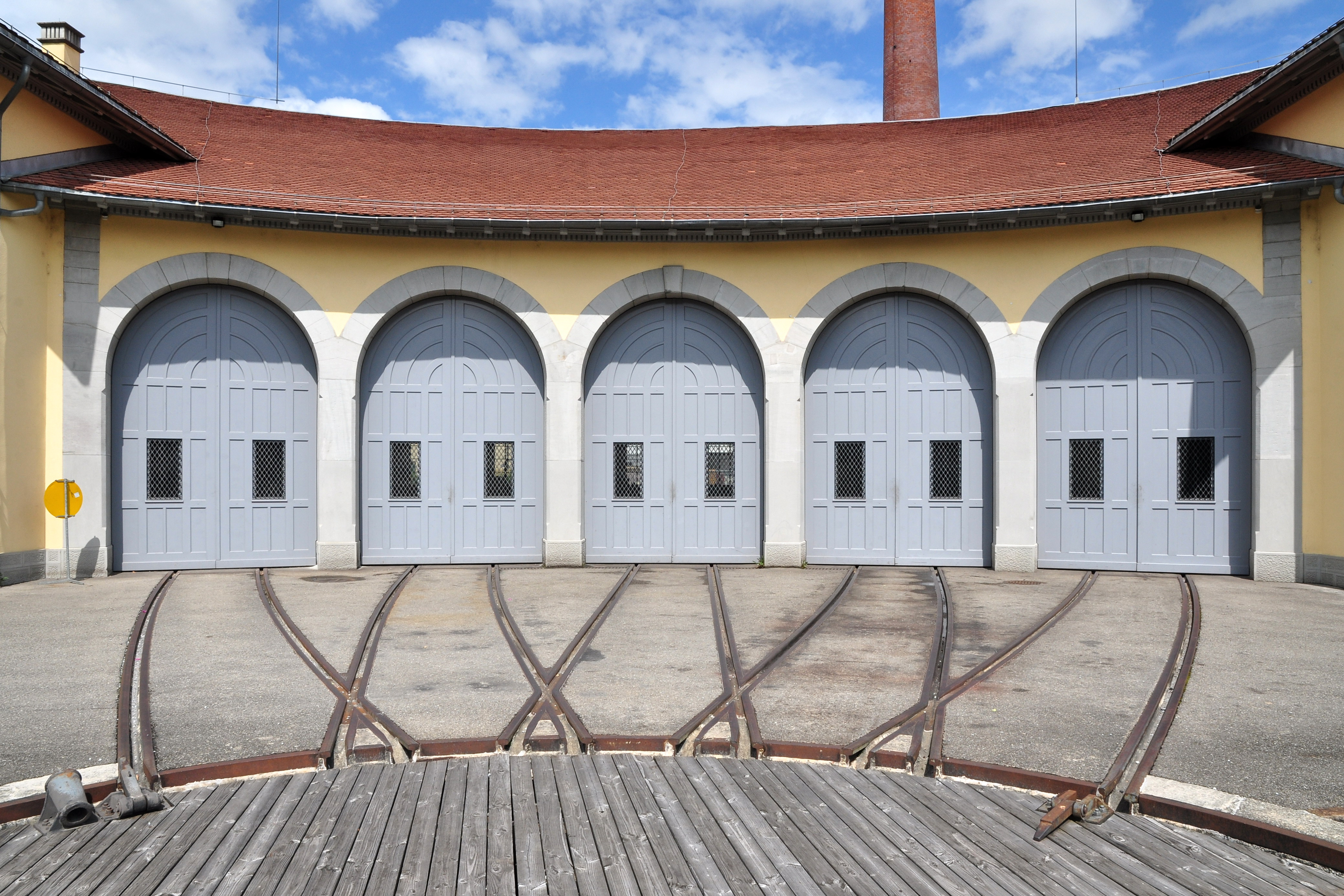 Bahnhof mit zwei Lok-Remisen in Uster. (Switzerland)